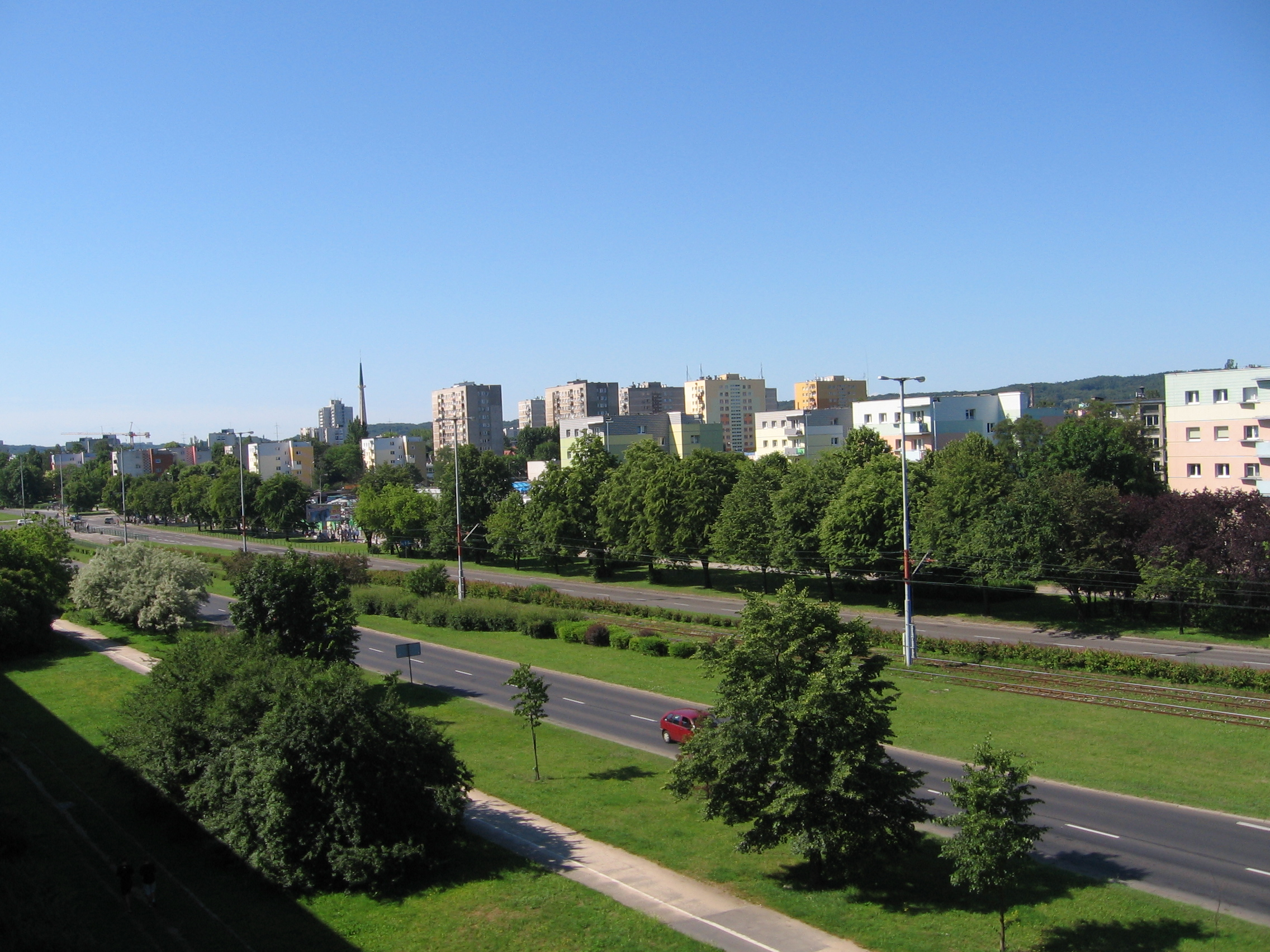 View on Gdansk Przymorze from Chlopska street